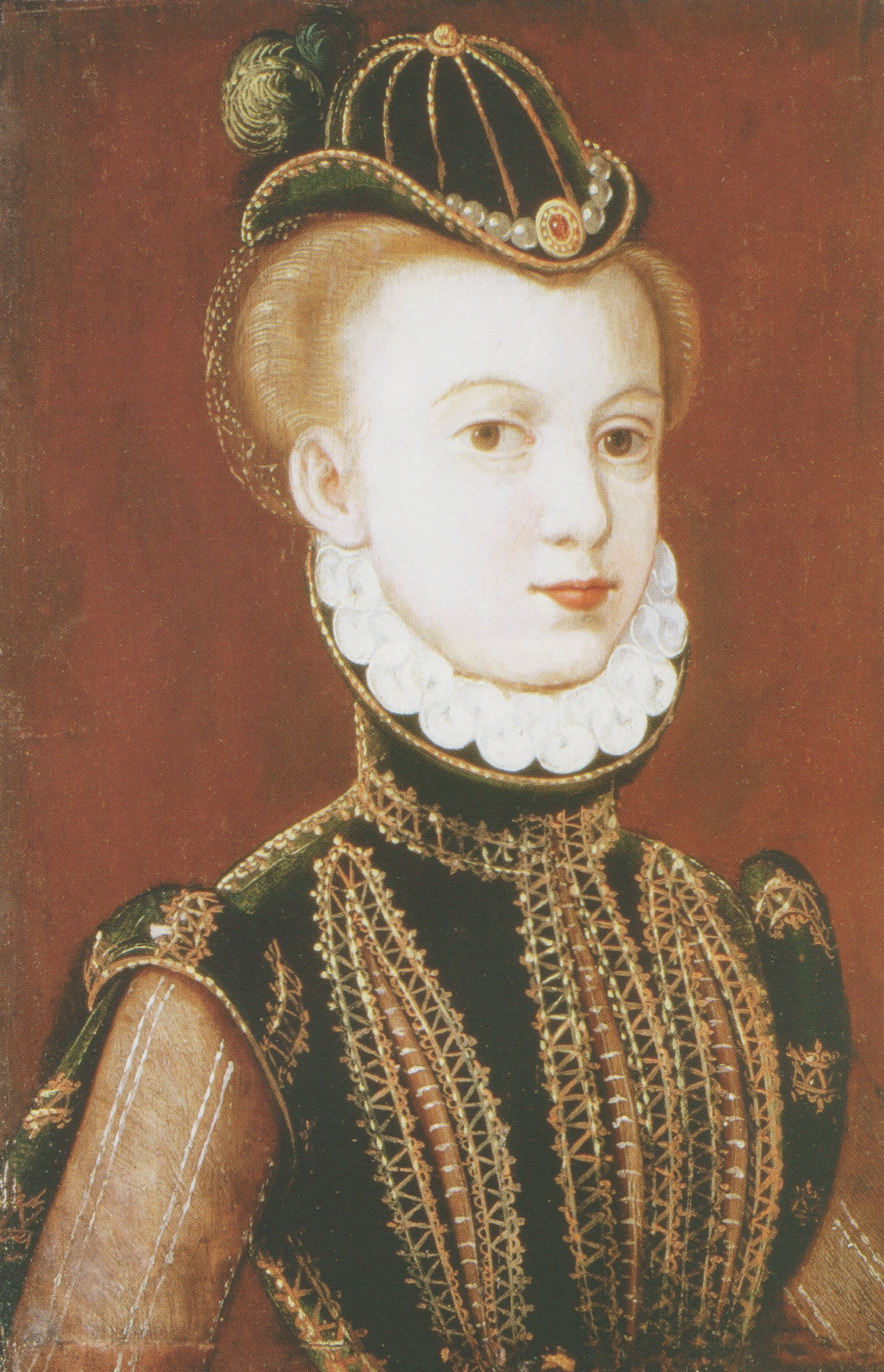 Ölgemälde auf Holz von Erdmuthe von Brandenburg, Herzogin von Pommern.